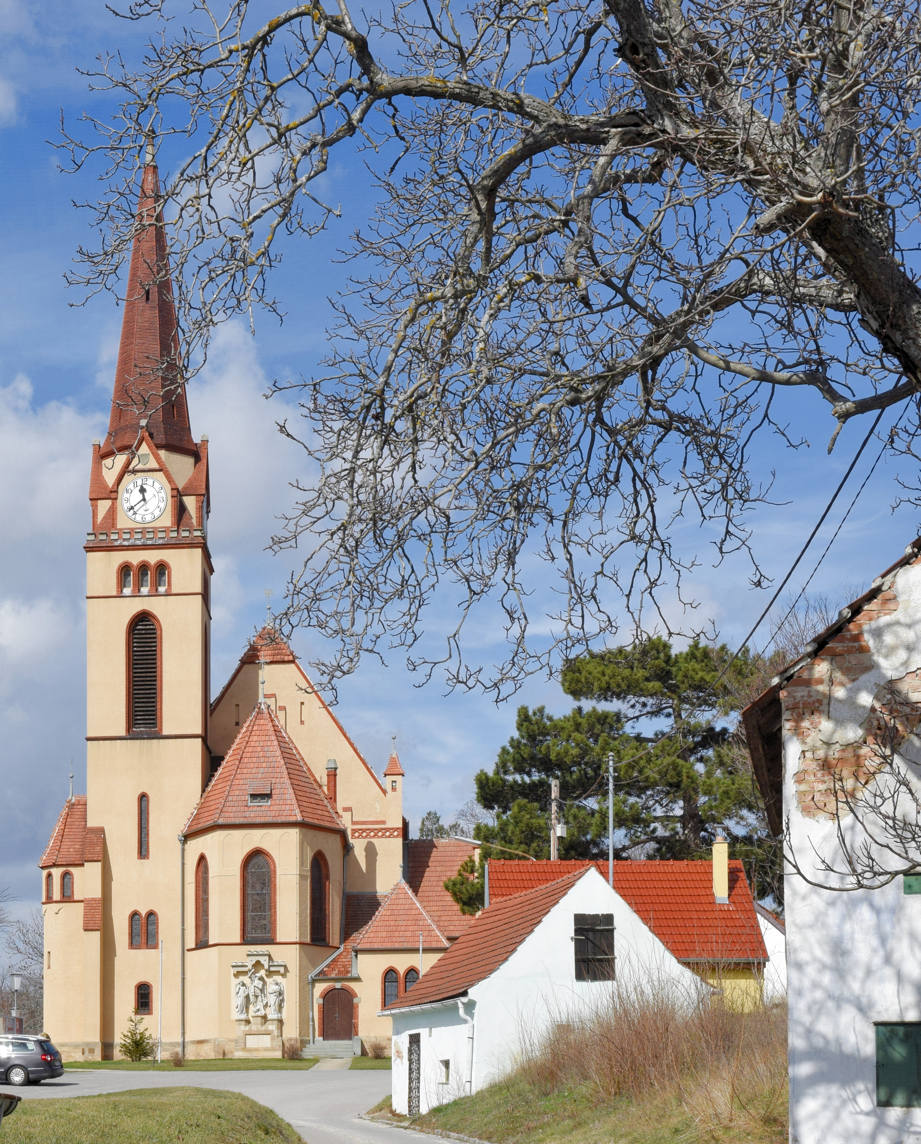 Kath. Pfarrkirche hl. Bartholomäus in Katzelsdorf